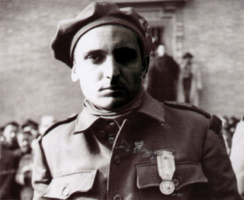 Arrigo Boldrini, il comandante "Bulow"